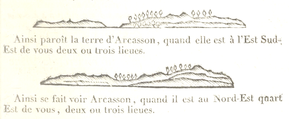 René Bougard, Le petit flambeau de la mer, 1817 : les passes d'entrée du Bassin d'Arcachon.